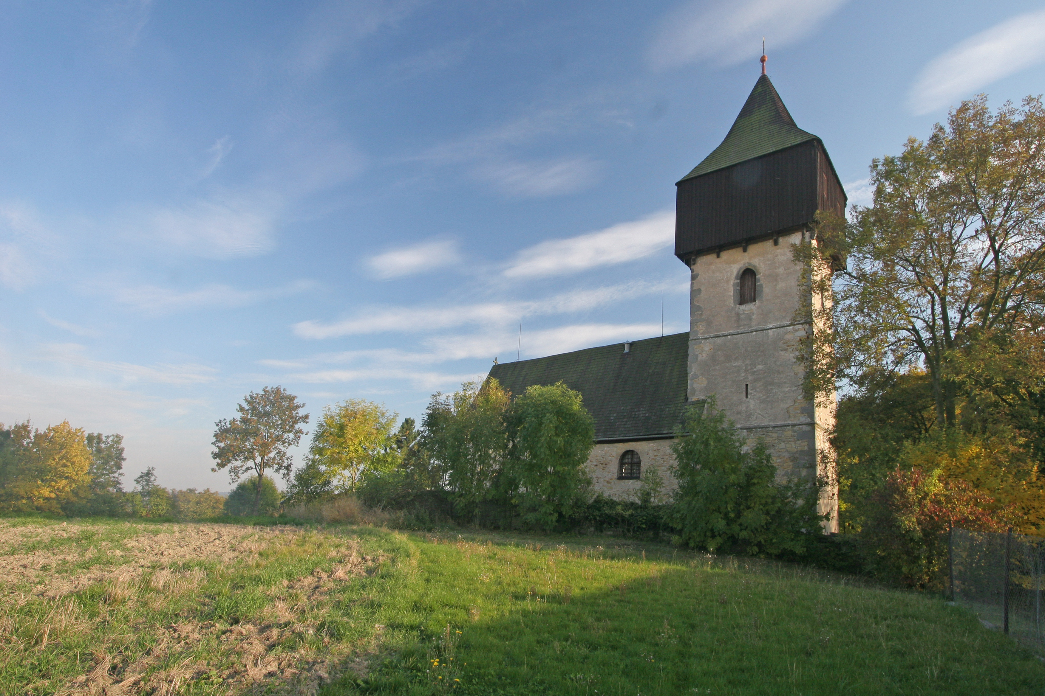 Kostel sv. Zikmunda (Králova Lhota), Králova Lhota